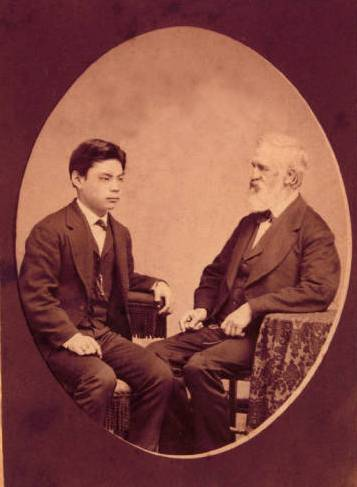 アメリカ留学中の岩崎弥之助。恩師エドワード・ホールと。1872年。